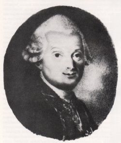 Portait anonyme de Charles-Henri-Louis d'Arsac, chevalier de Ternay.